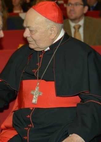 Cardinale Elio Sgreccia